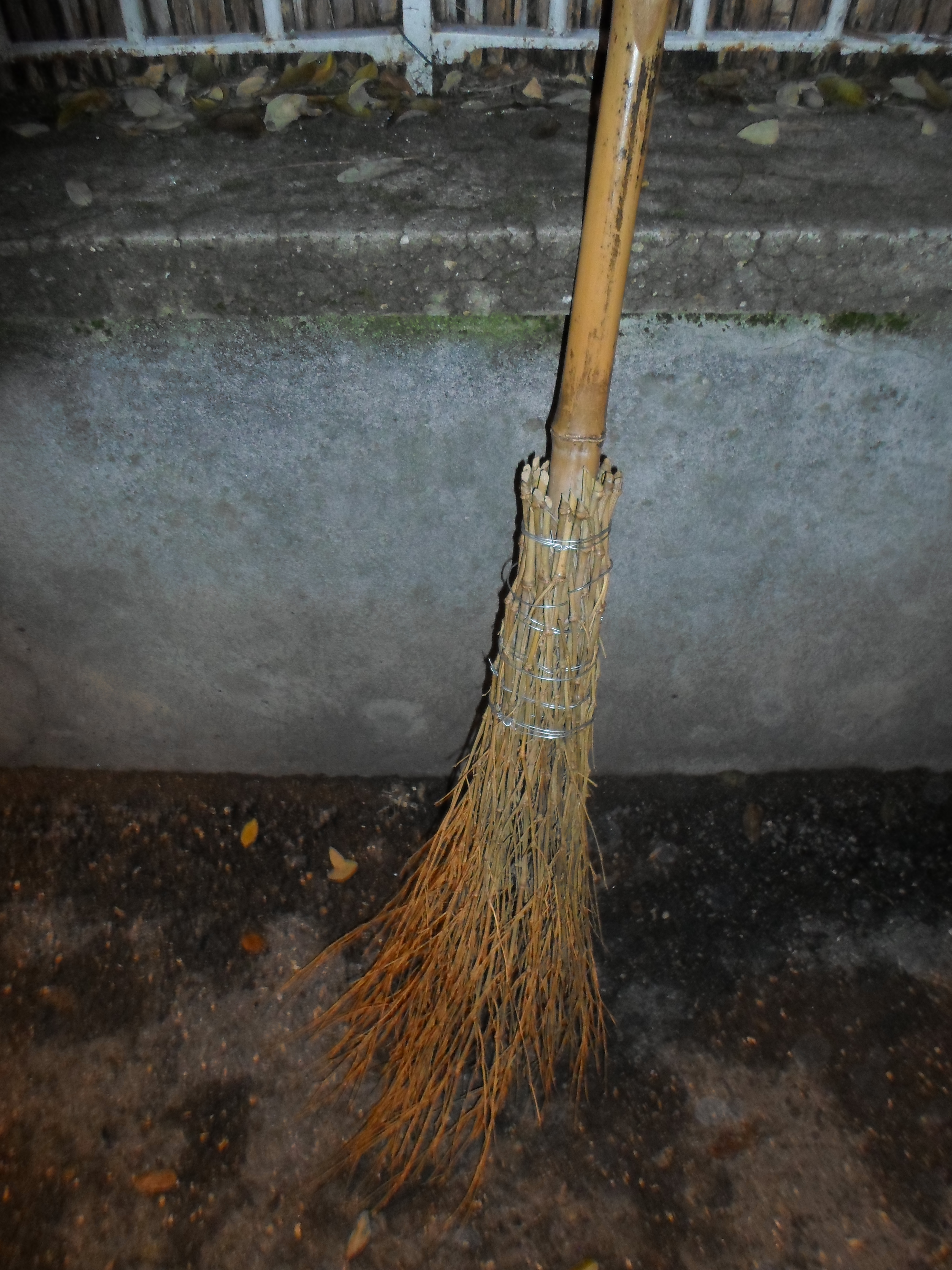 balais en bambou bamboo brooms DIY